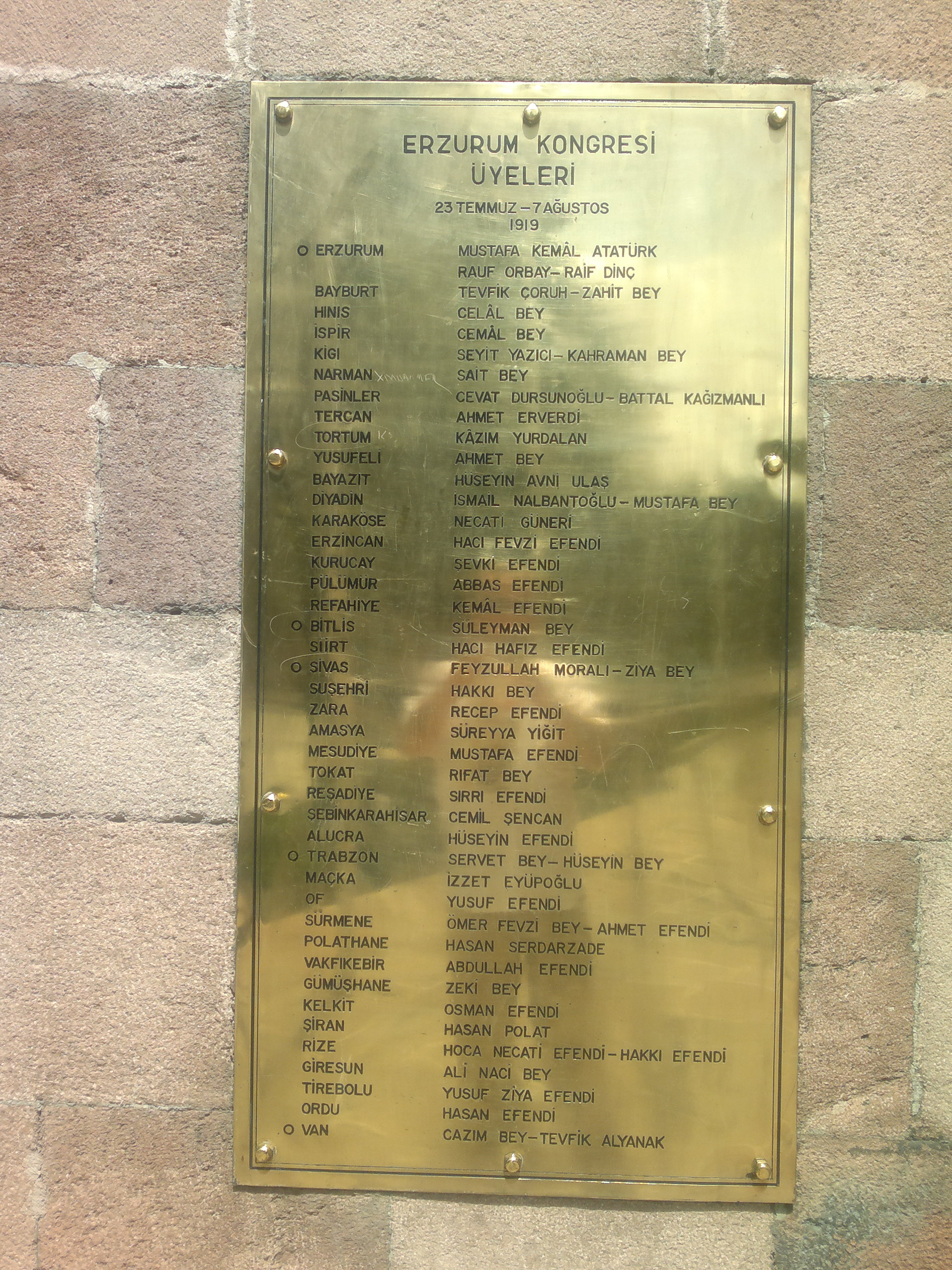 23 Temmuz-9 Ağutos 1919 Erzurum Kongresine katılan Delege Listesi